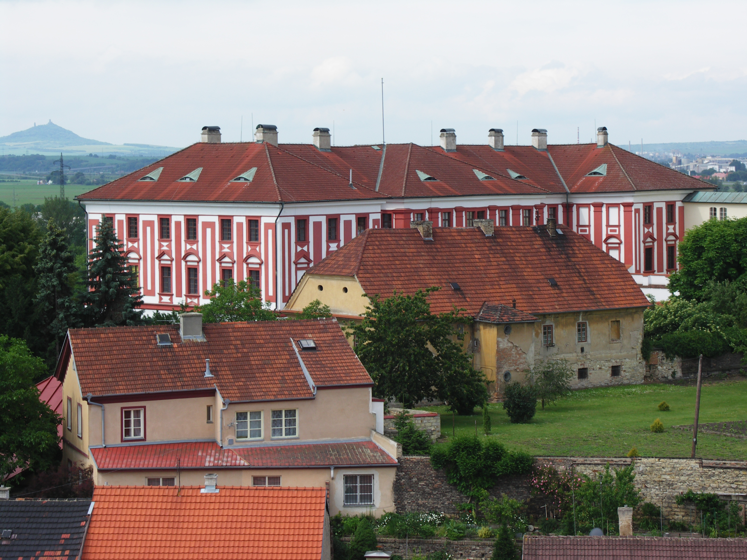 Biskupství (Litoměřice), Dómské náměstí 1, Litoměřice